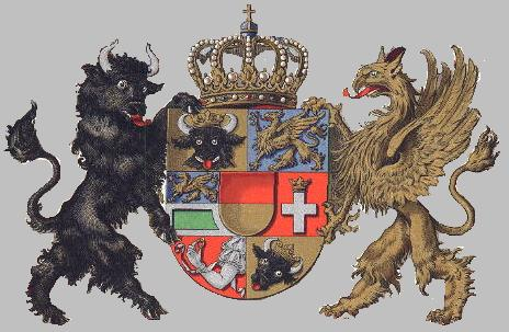 Escudo Ducado de Mecklemburgo Siebenfeldriges mecklenburgisches Wappen besteht aus sechs Feldern und einem Mittelschilde. Jedes Feld symbolisiert einen der sieben Hauptherrschaftsteile des mecklenburgischen Staates: Herzogtum Mecklenburg: Auf goldenem Grunde ein schwarzer Stierkopf mit aufgerissenem roten Maule und ausgestreckter roter Zunge; auf dem Kopfe silberne Hörner und eine goldene Lilienkrone. Herrschaft Rostock: Auf blauem Grunde schreitend ein goldener Greif mit ausgestreckter Zunge und aufgehobener rechter Vorderklaue. Fürstentum Schwerin/Bistum Schwerin: Ein quer geteiltes Feld; in der oberen blauen Hälfte ein goldener Greif, in der unteren silbernen Hälfte ein grünes Viereck. Fürstentum Ratzeburg/Bistum Ratzeburg: Auf rotem Grunde stehend ein silbernes Kreuz mit goldener Krone. Herrschaft Stargard: Auf rotem Grunde ein silberner weiblicher Arm mit goldenem Ringe zwischen Daumen und Zeigefinger. Fürstentum Wenden/Herrschaft Werle: Auf goldenem Grunde ein schrägliegender Stierkopf mit silbernen Hörnern und goldener Lilienkrone, aber mit geschlossenem Maule. Grafschaft Schwerin: Der quer geteilte Mittelschild; die obere Hälfte rot, die untere golden. Das Wappen wird von einem Stier und einem Greif gehalten und ist mit der Königskrone geschmückt. Der Großherzog von Mecklenburg-Strelitz führt Wappen und Titel mit dem Großherzog von Mecklenburg-Schwerin gemeinschaftlich.